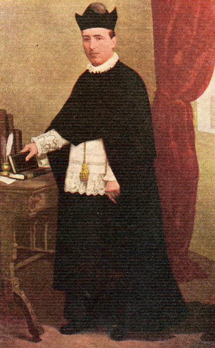 Retrat de Josep Tarongí Cortès del s. XIX. Josep Taronjí Cortès (Palma, 1847 - 1890) eclesiàstic i escriptor mallorquí.